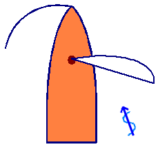 Binnen de windse koers met zeil over stuurboord eigen bewerking van het plaatje van voor de wind